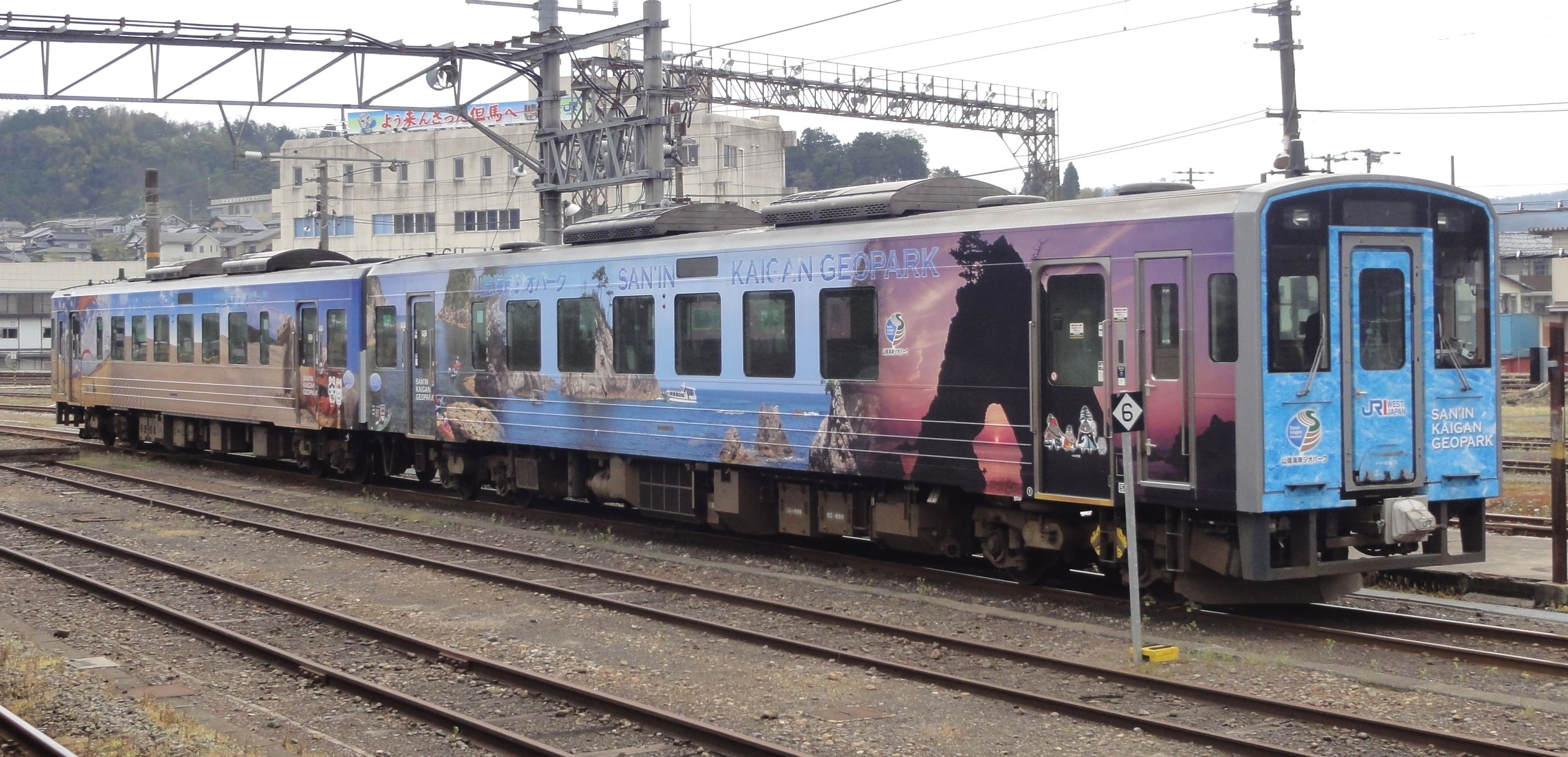 JR西日本キハ126系気動車、豊岡駅にて